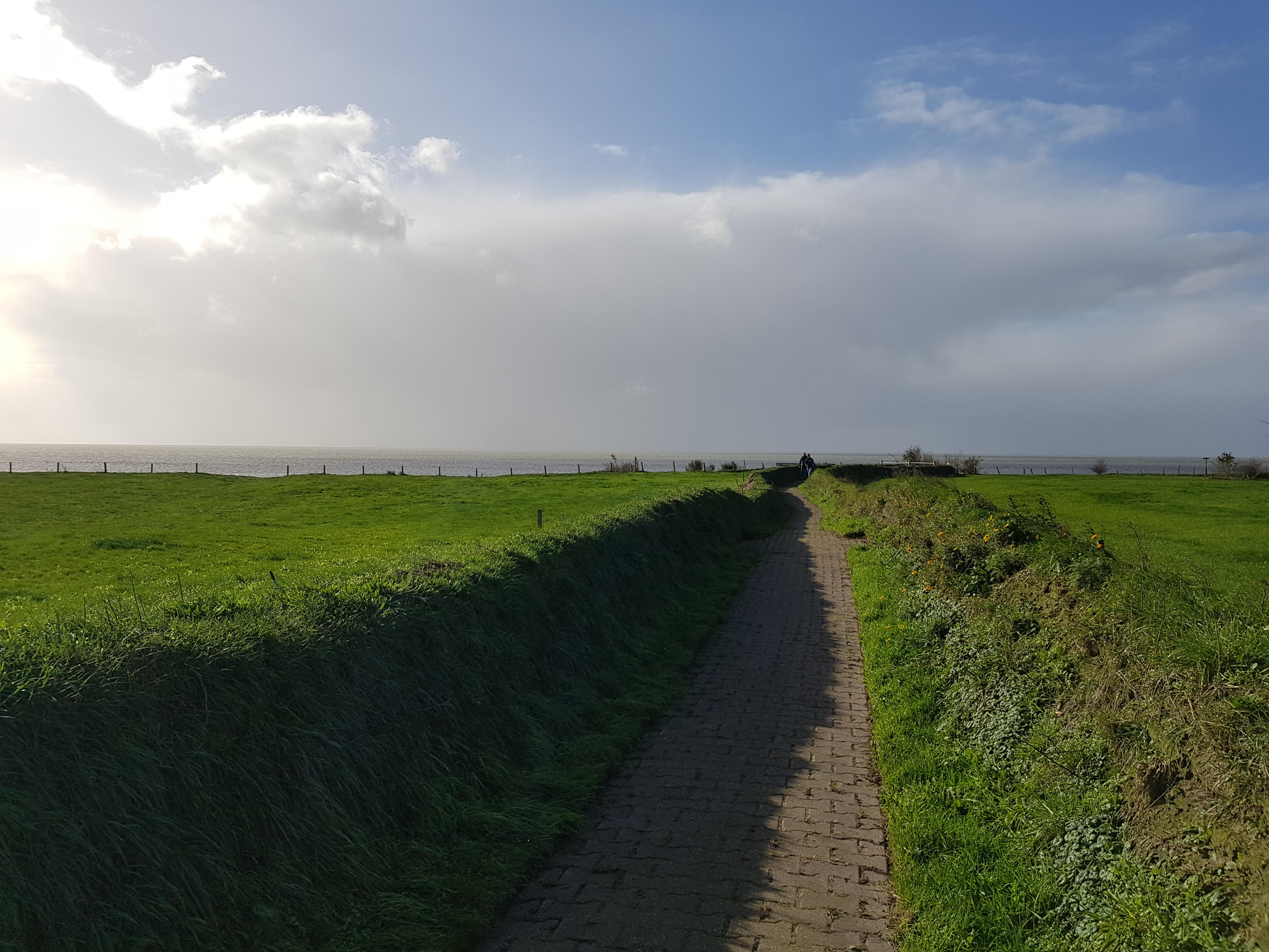 Oudemirdumer Klif, Oudemirdum, Friesland, Nederland